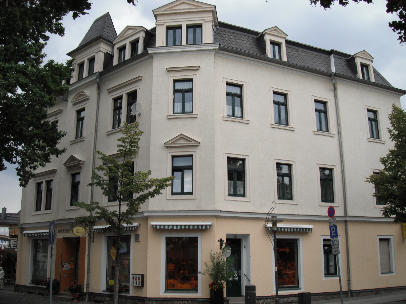 Denkmalgeschütztes Haus in Radebeul, Hauptstraße 20